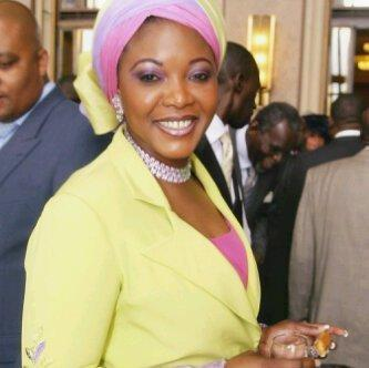 Edith Lucie Bongo à une réunion